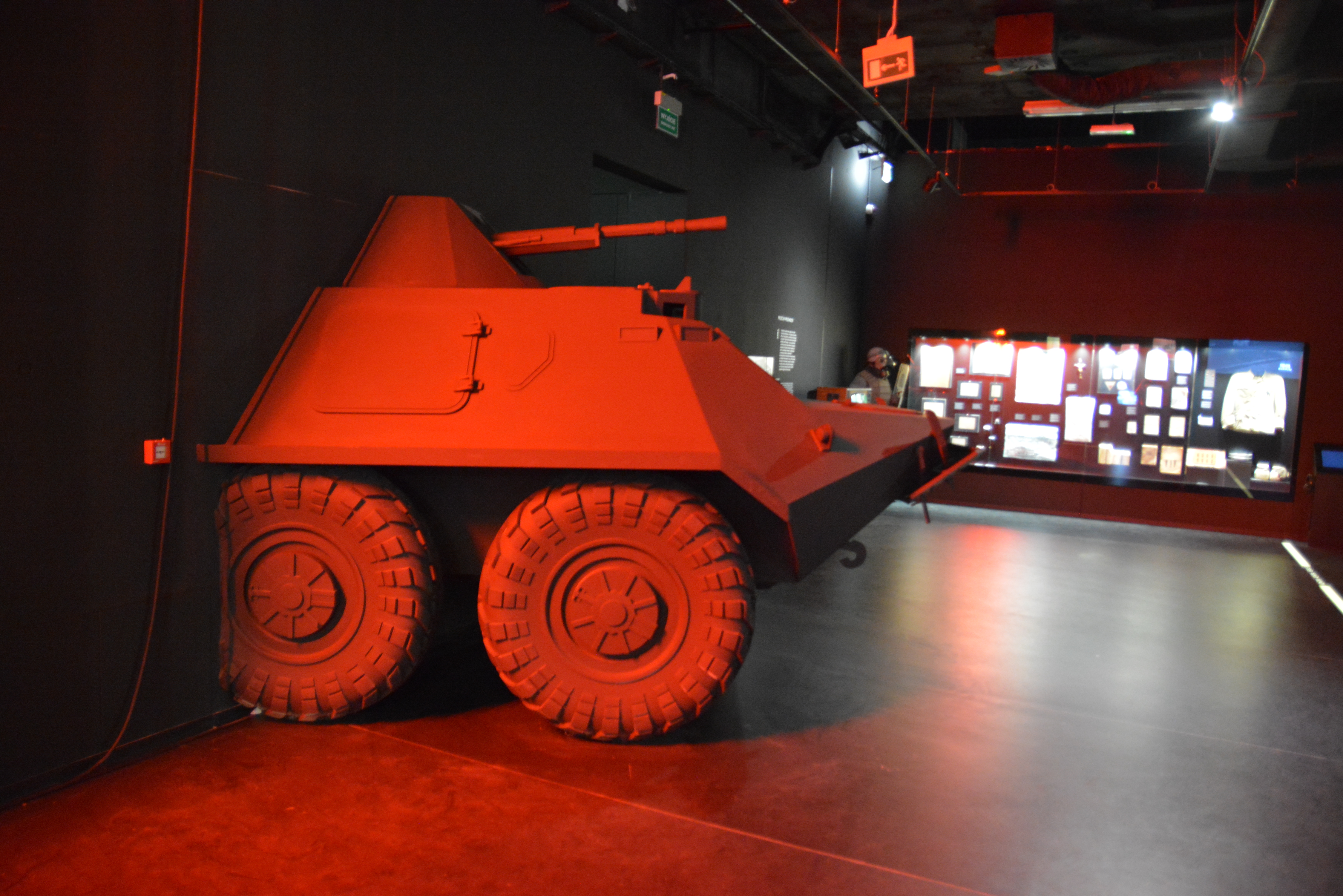 Centrum Dialogu Przełomy - Oddział Muzeum Narodowego w Szczecinie